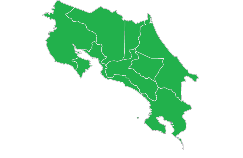 Resultados electorales provinciales 1953 and 1974, fuente